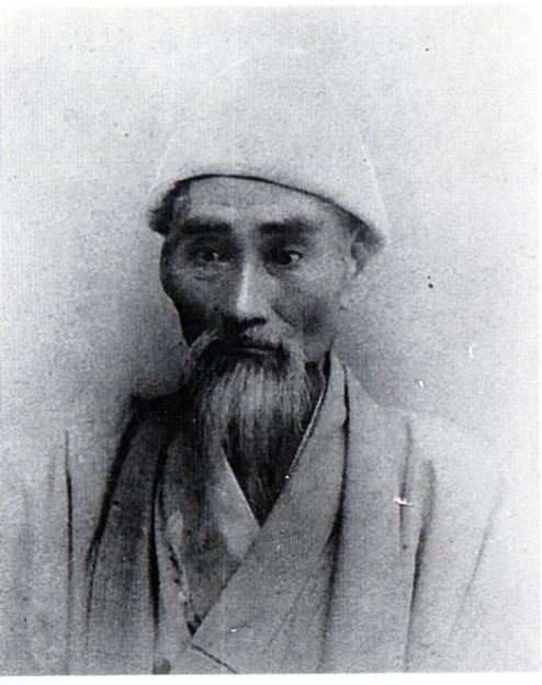 Tosaku Yokoo（横尾東作）was a Mariner of Japan in the Meiji period．仙台藩士。文久3年初春、鉄砲州慶應義塾にて福沢諭吉に学ぶ。